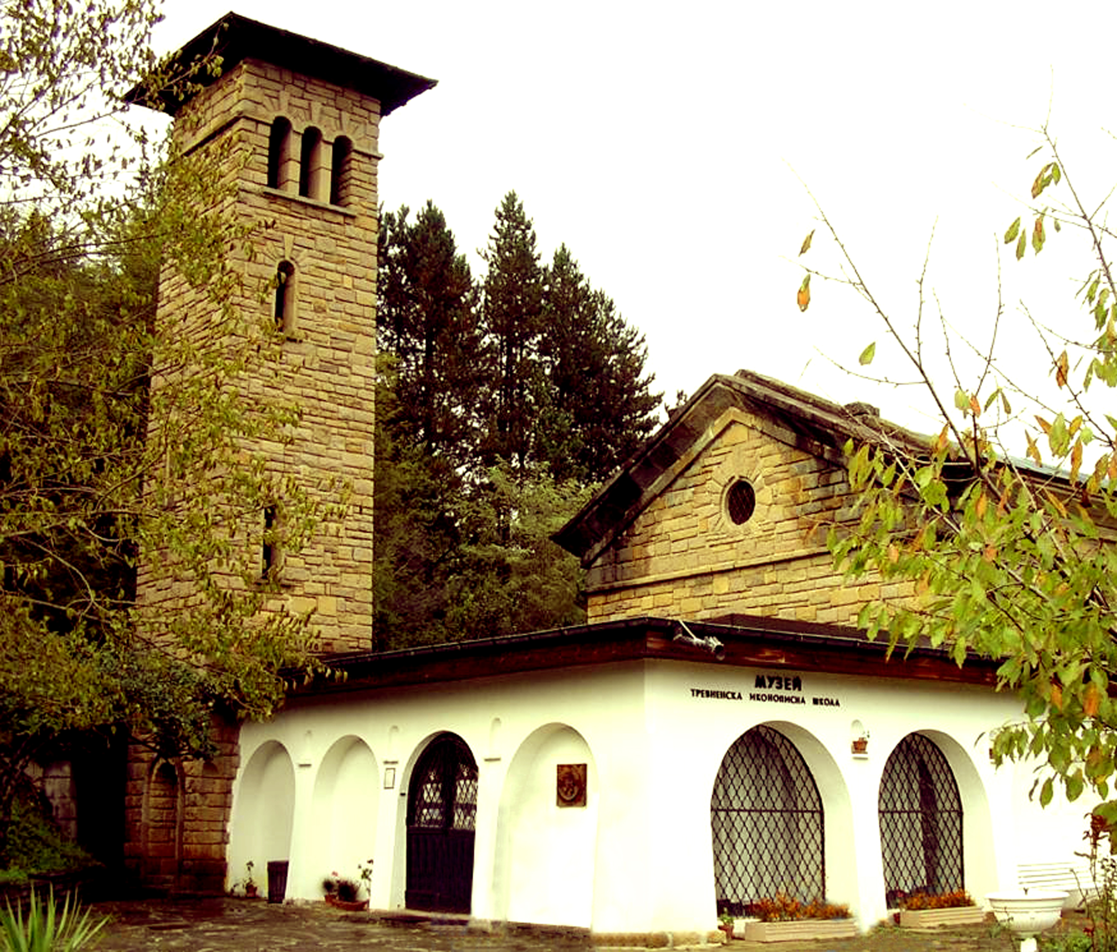 Царски детски санаториум Трявна - Галерията-музей на възрожденската Тревненска иконописна художествена школа при параклиса на санаториума